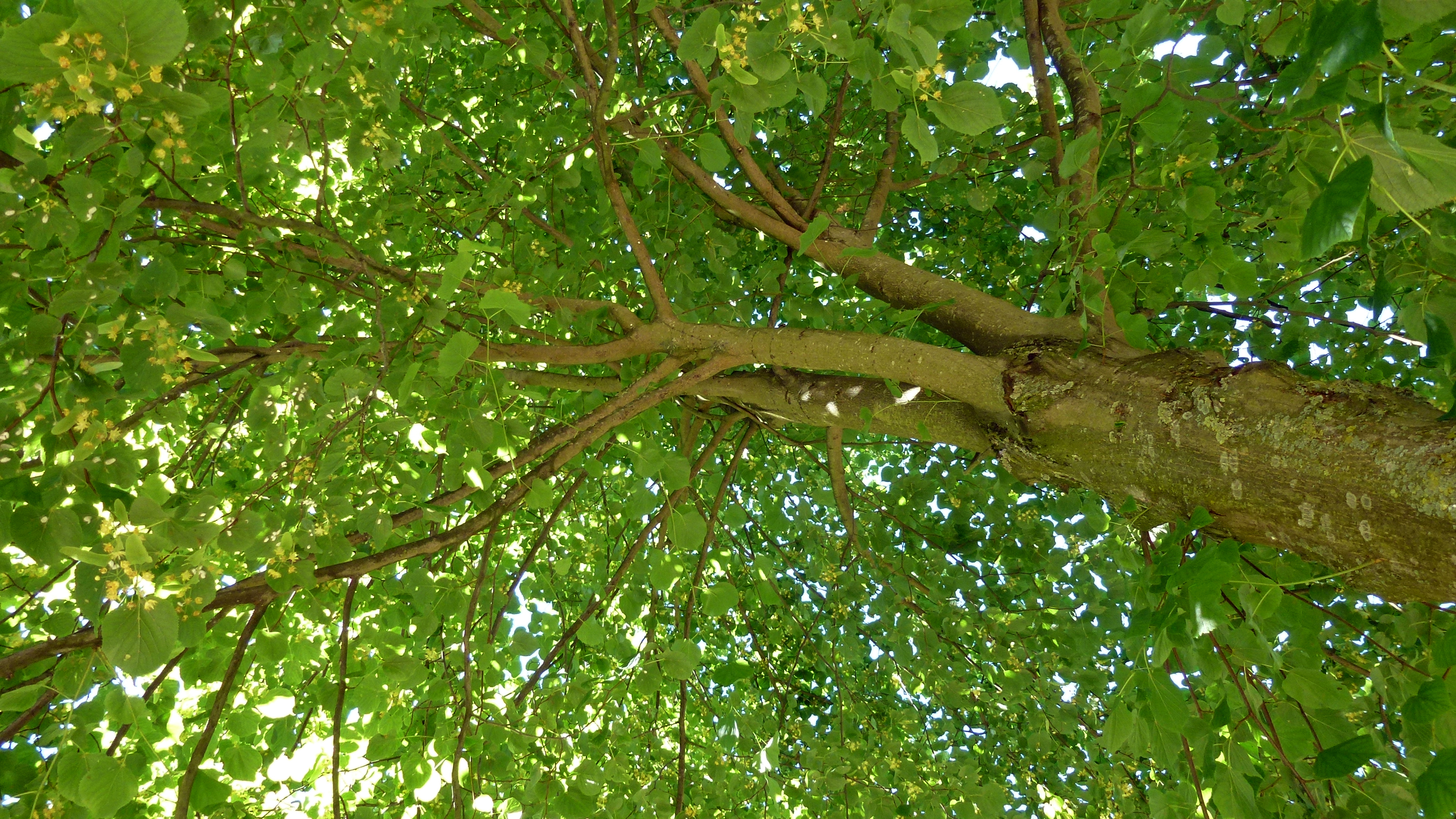 Amaliaboom - Tilia x europaea - in de wijk Bloemendaal in Gouda. Geplant in de natuurspeeltuin Groenhovenpark in 2014. Brede tak van de lindeboom